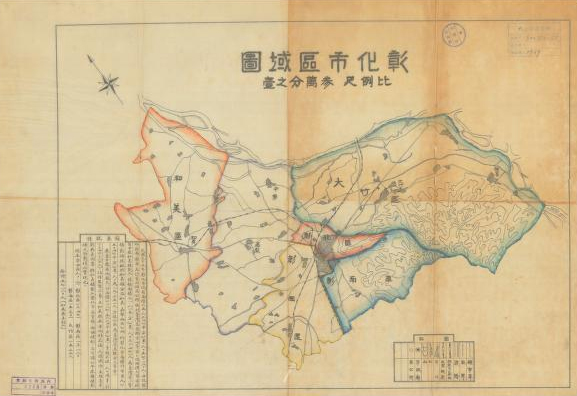 中文（台灣）: 彰化市在戰後分為彰北區、彰南區、彰西區和大竹區，曾計畫合併當時的台中縣和美鎮並另設和美區和嘉犁區